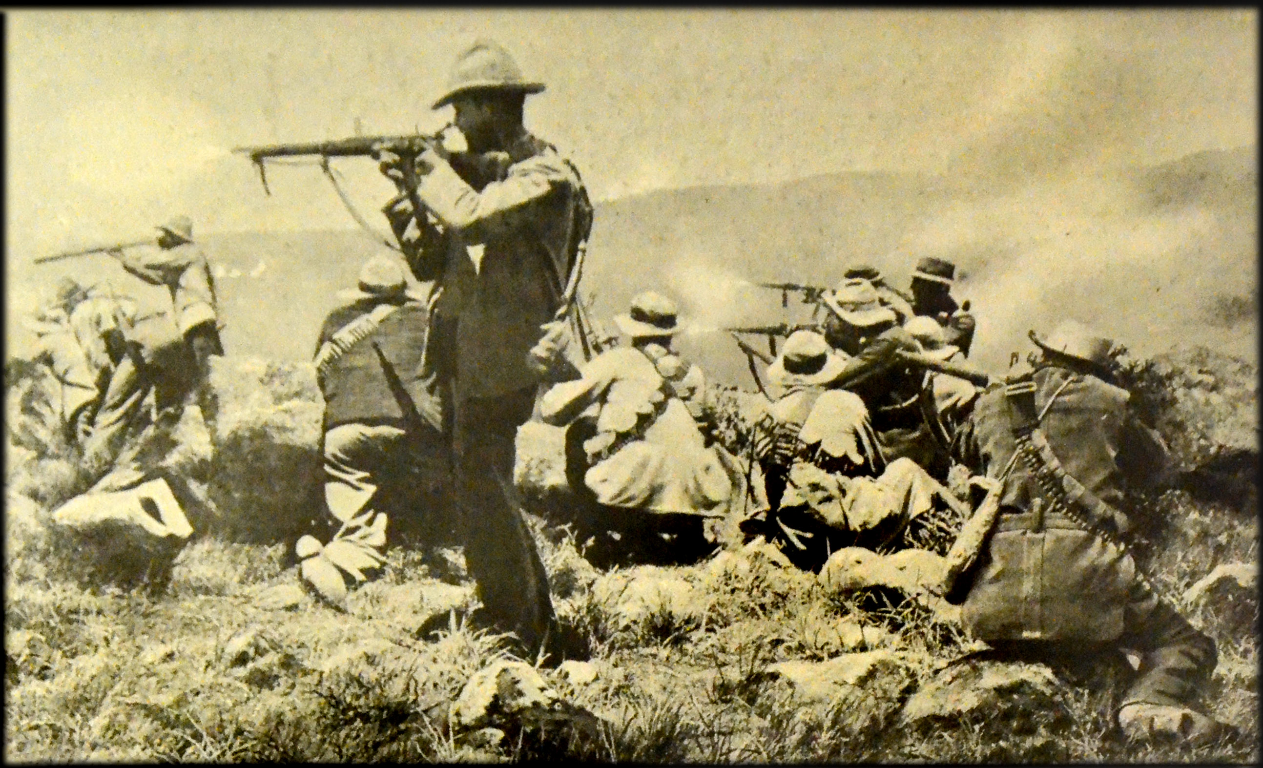 Photo ancienne introduisant un article du journal français la "Revue illustrée" (Tome relié 1902), article intitulé "L'épopée des Boers" (Guerre du Transvaal) dans la "Revue illustrée" (Tome relié 1902, p 41)